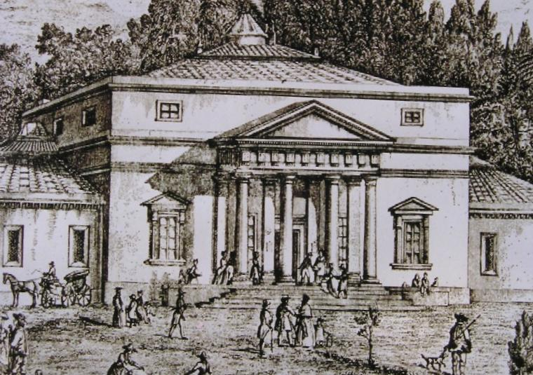 I Bagnetti della Puzzolente a Livorno in un'antica stampa ottocentesca